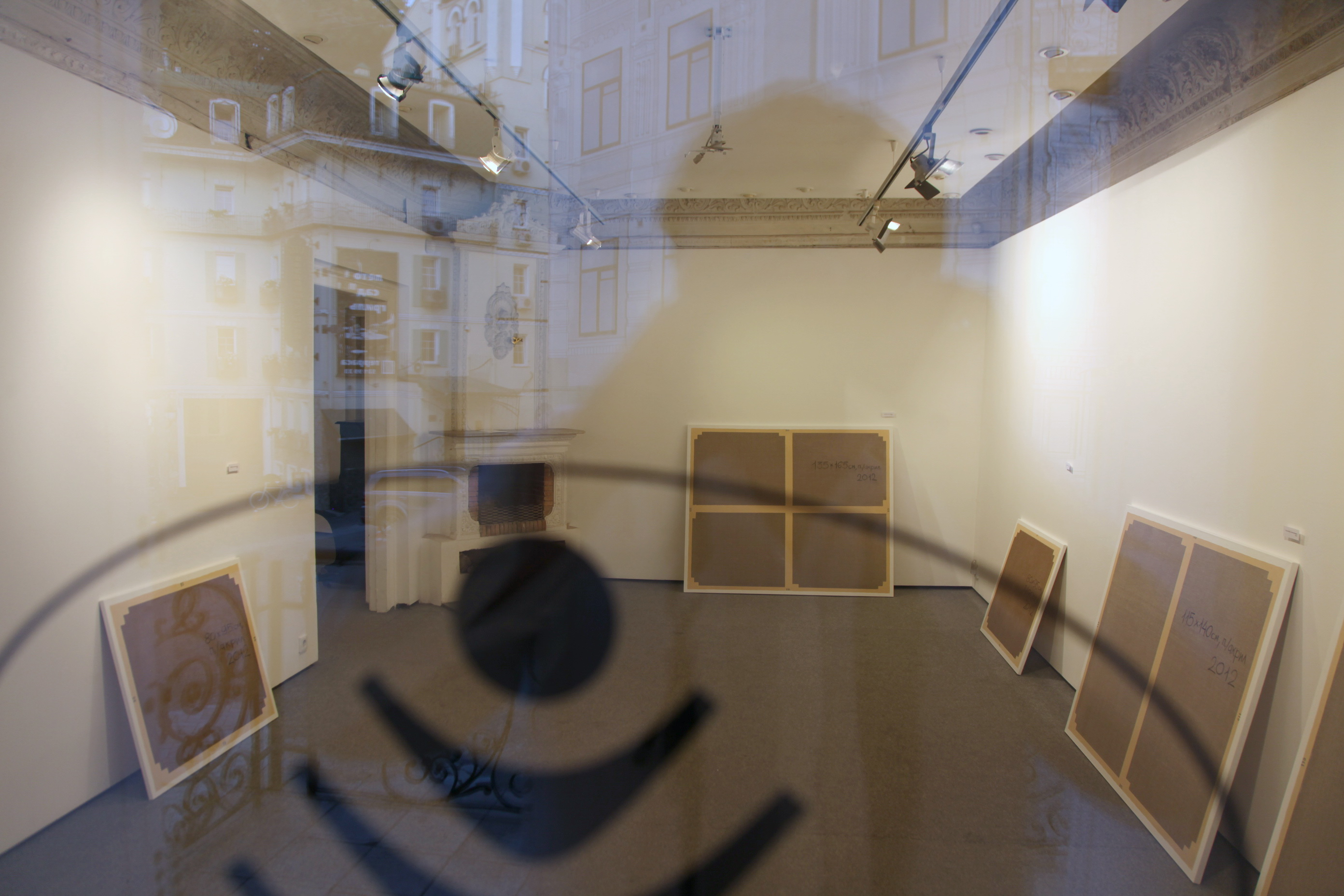 Роберт Саллер "No name", 2013